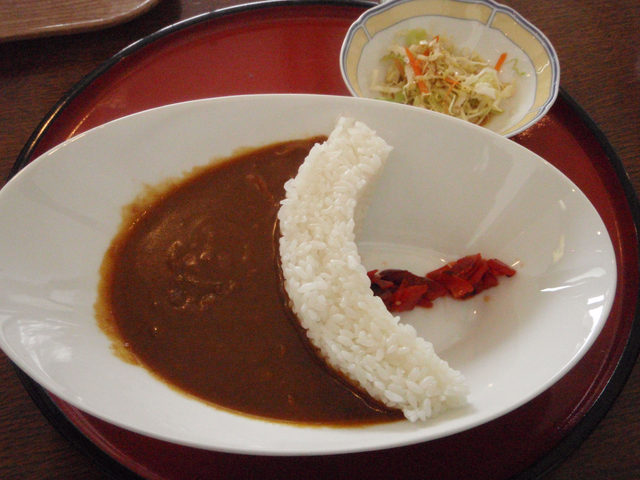 OLYMPUS DIGITAL CAMERA みなかみダムカレー 水上温泉旅館協同組合